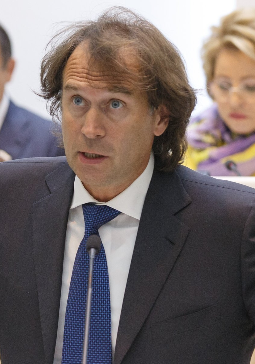 Лисовский, Сергей Фёдорович